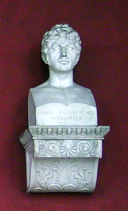 Bust of Georg v. Reichenbach at Ruhmeshalle ("Hall of fame"), München, Germany. Picture taken by myself: Dominik Hundhammer, München, 27 March 2006.